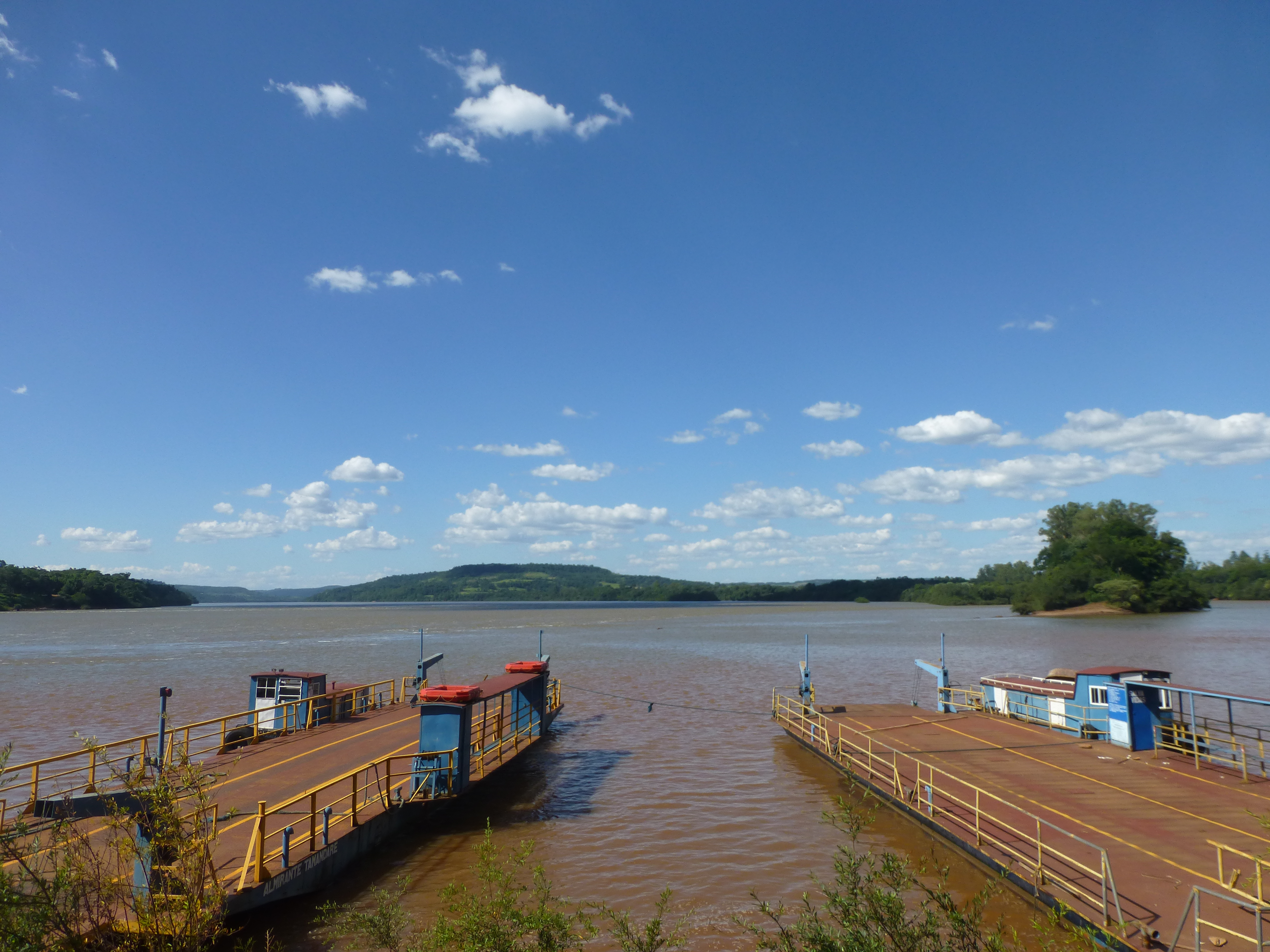 Dos balsas amarradas en la costa del río Uruguay en la localidad de Porto Mauá, Rio Grande do Sul, Brasil.